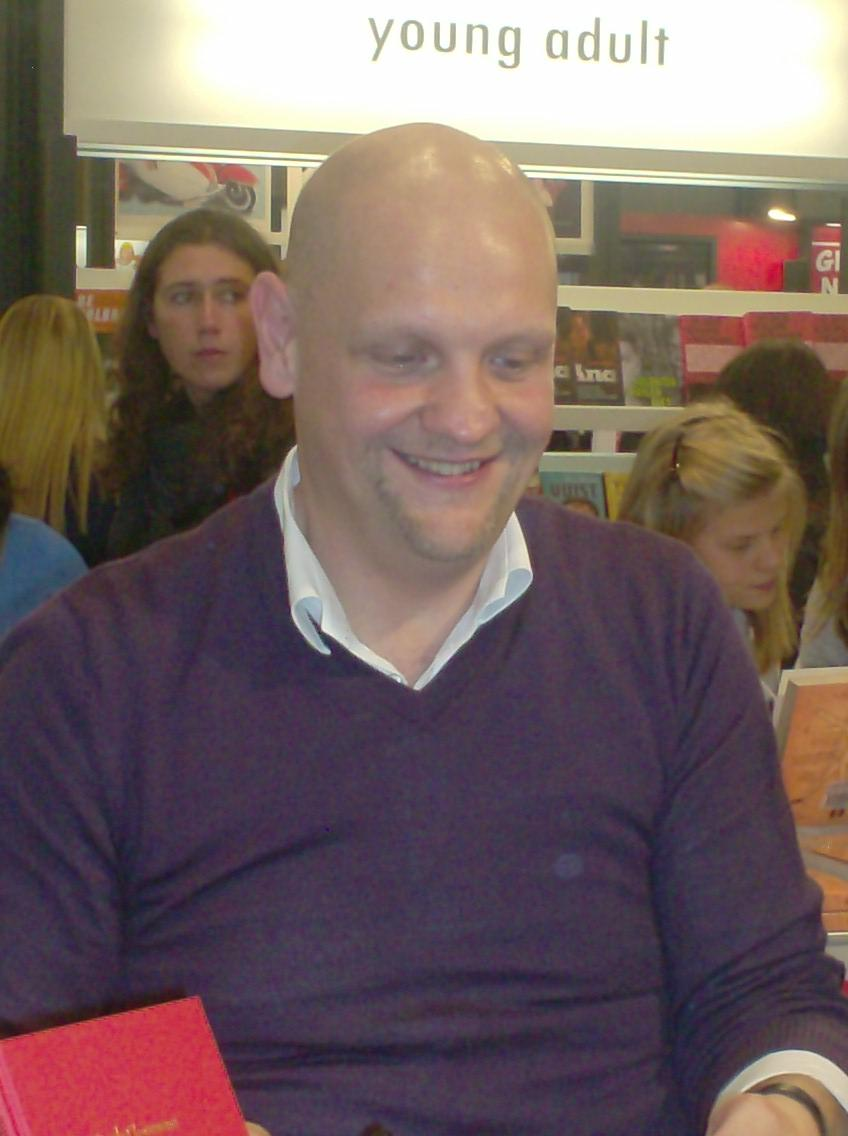 Foto van Steph Goossens op de Boekenbeurs 2010